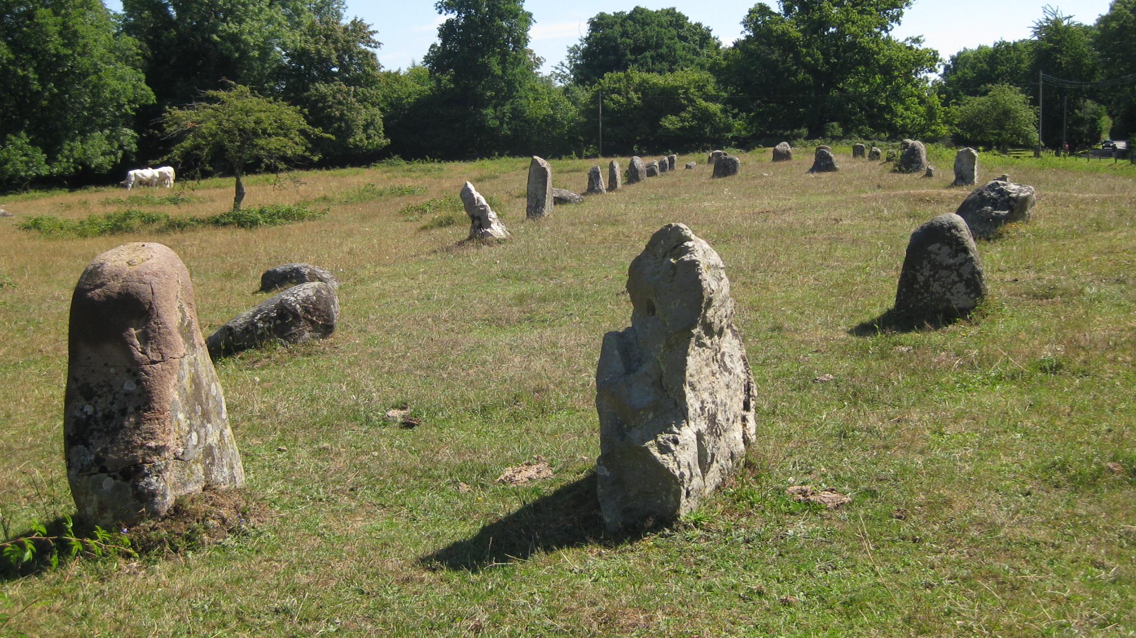 Ängakåsen. Skeppssättning och gravfält nära kungagraven i Kivik.